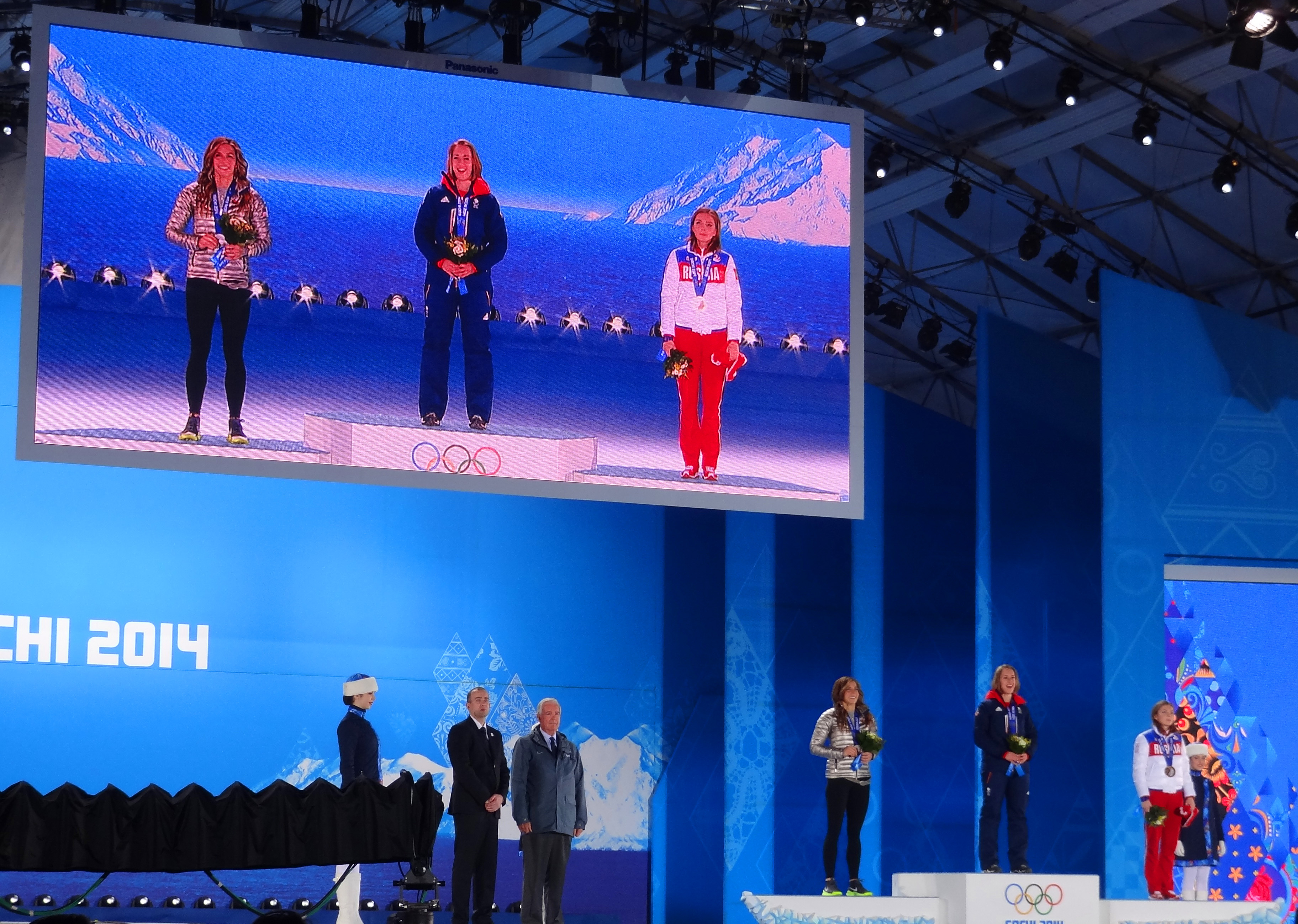 Скелетон на зимних Олимпийских играх 2014. Соревнования в скелетоне среди женщин на зимних Олимпийских играх 2014 года прошли 13 и 14 февраля. В соревнованиях принимают участие 20 спортсменок из 12 стран. Местом проведения заездов стала санно-бобслейная трасса «Санки». Медалисты Золото - Элизабет Ярнольд (Великобритания). Серебро - Ноэль Пайкус-Пейс (США). Бронза - Елена Никитина (Россия).